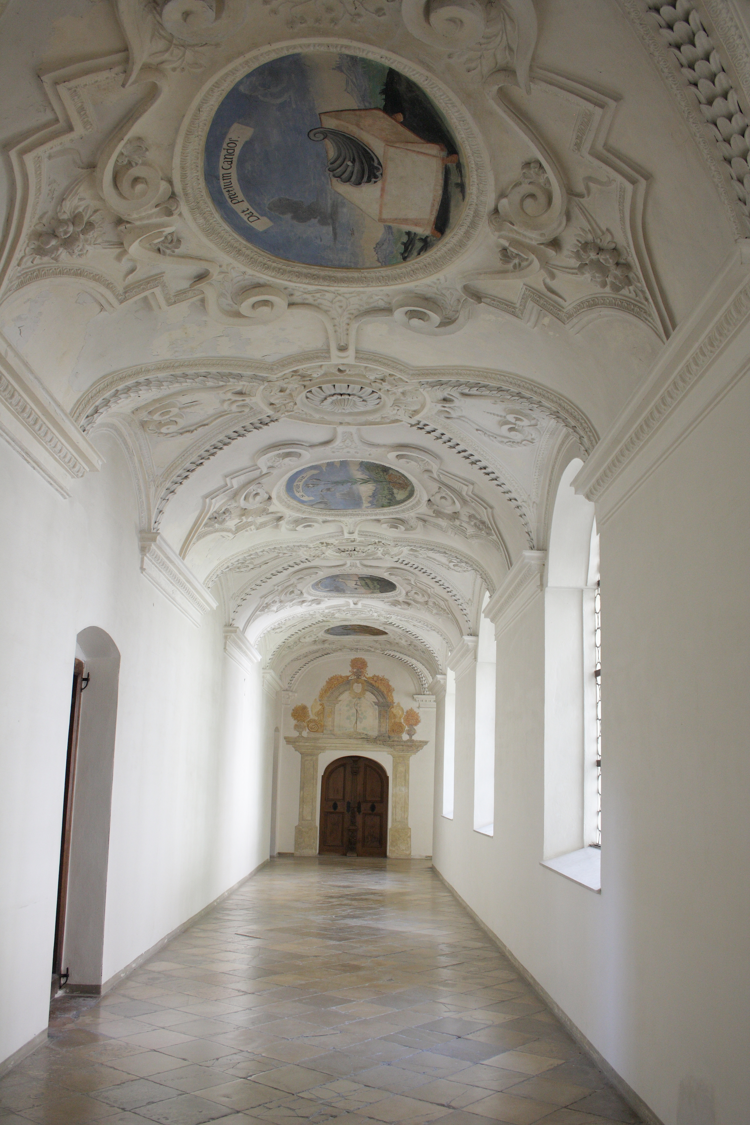 Kreuzgang mit Emblematischer Deckenmalerei (Secco-Malerei) Kloster Wettenhausen in Kammeltal im Landkreis Günzburg (Bayern)